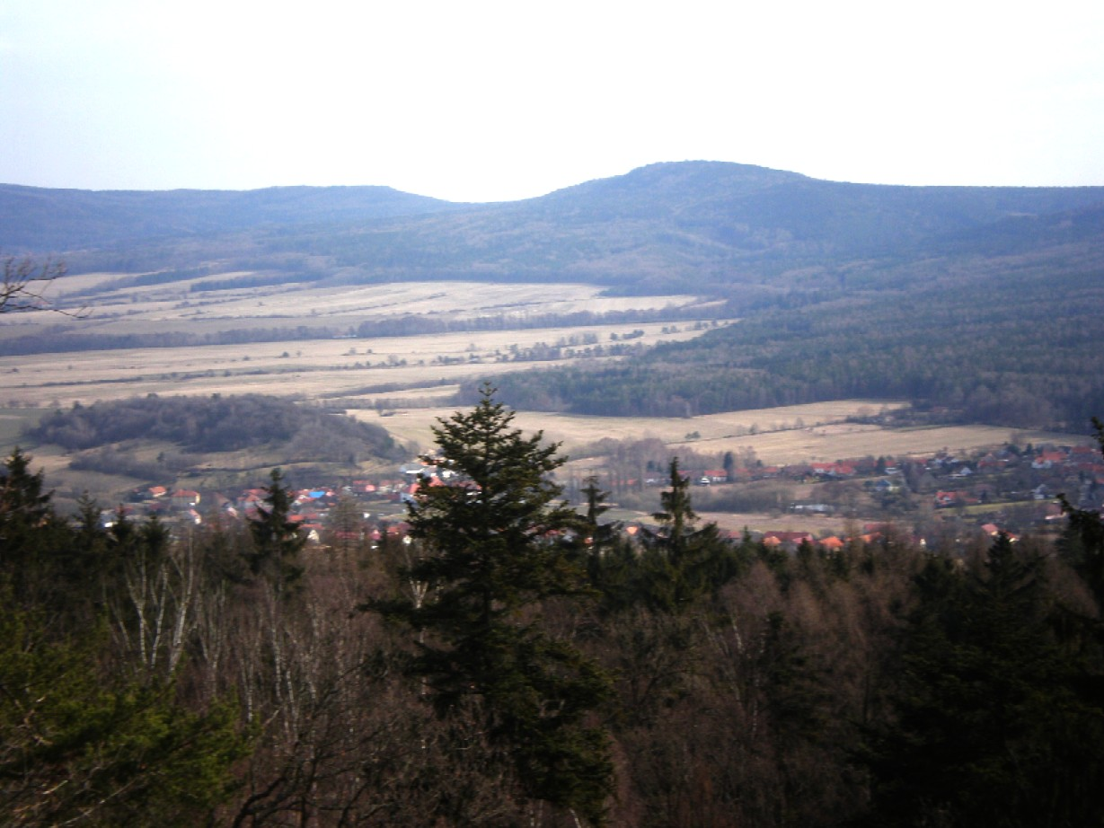 Studený vrch (vpravo) a Hradec (vlevo) na brdských Hřebenech, od severozápadu (??).